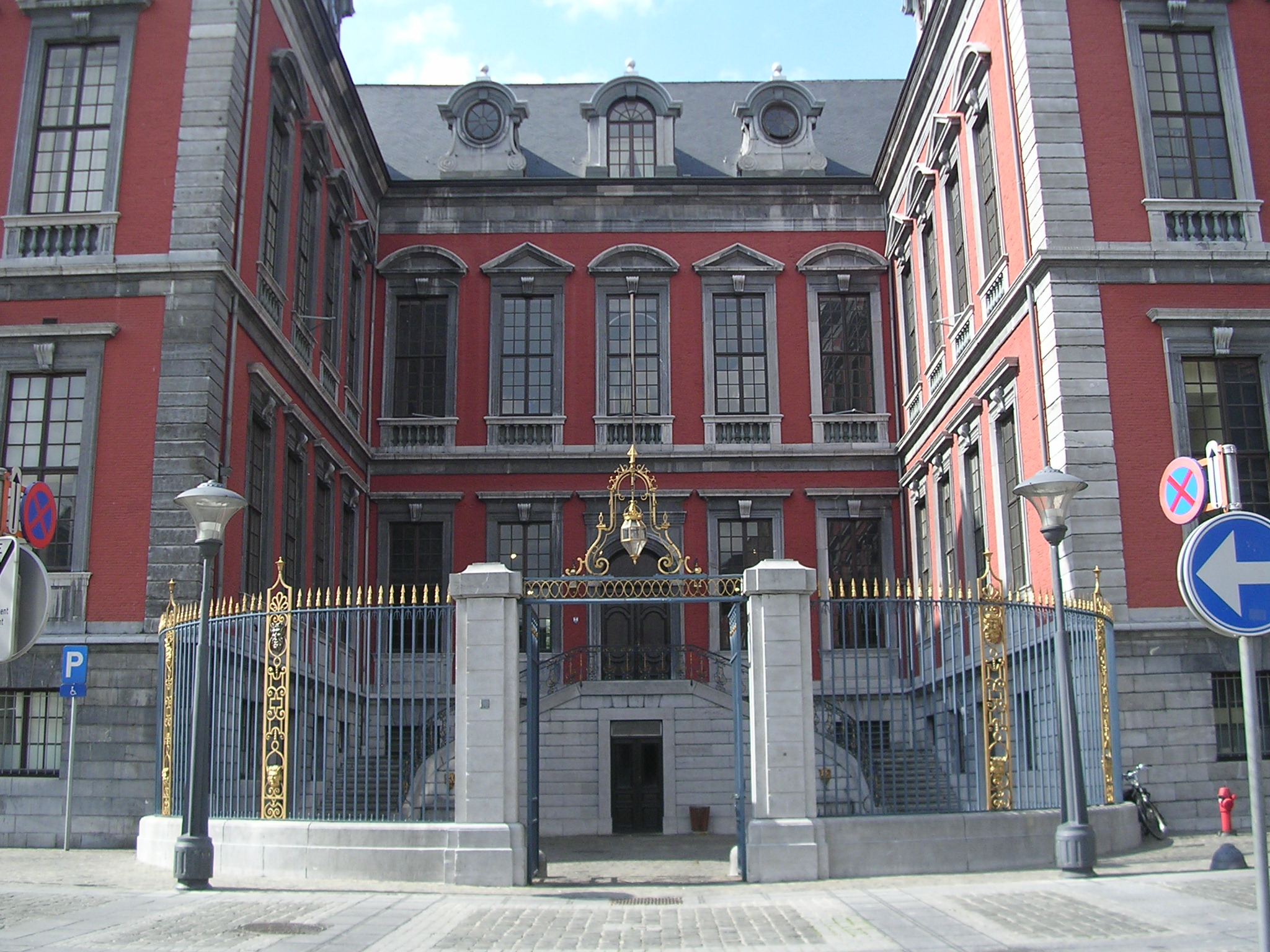 Hôtel de ville "La Violette" (1)